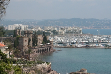 Ville de Mandelieu-la-Napoule Utilisateur:Geoffrey06 Photo prise par Geoffrey06